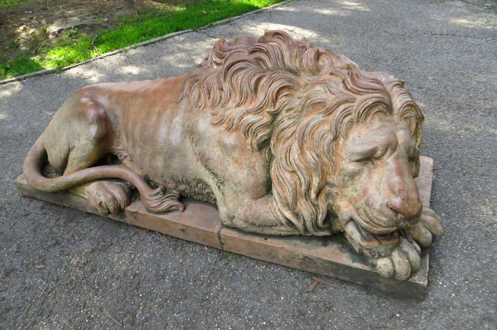 Županijski park